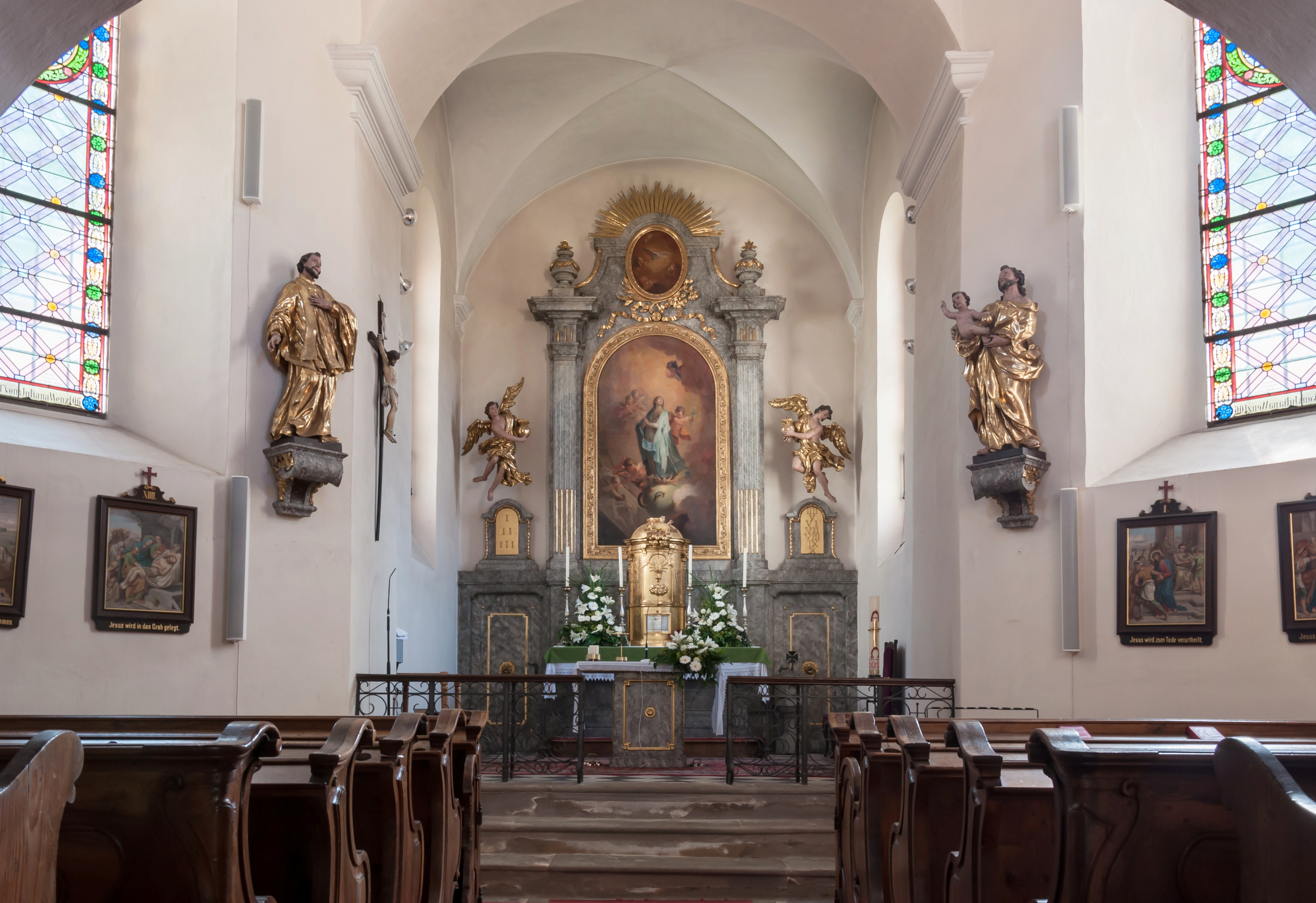 Chor der Kath. Pfarrkirche Unbefleckte Empfängnis in Tobelbad.